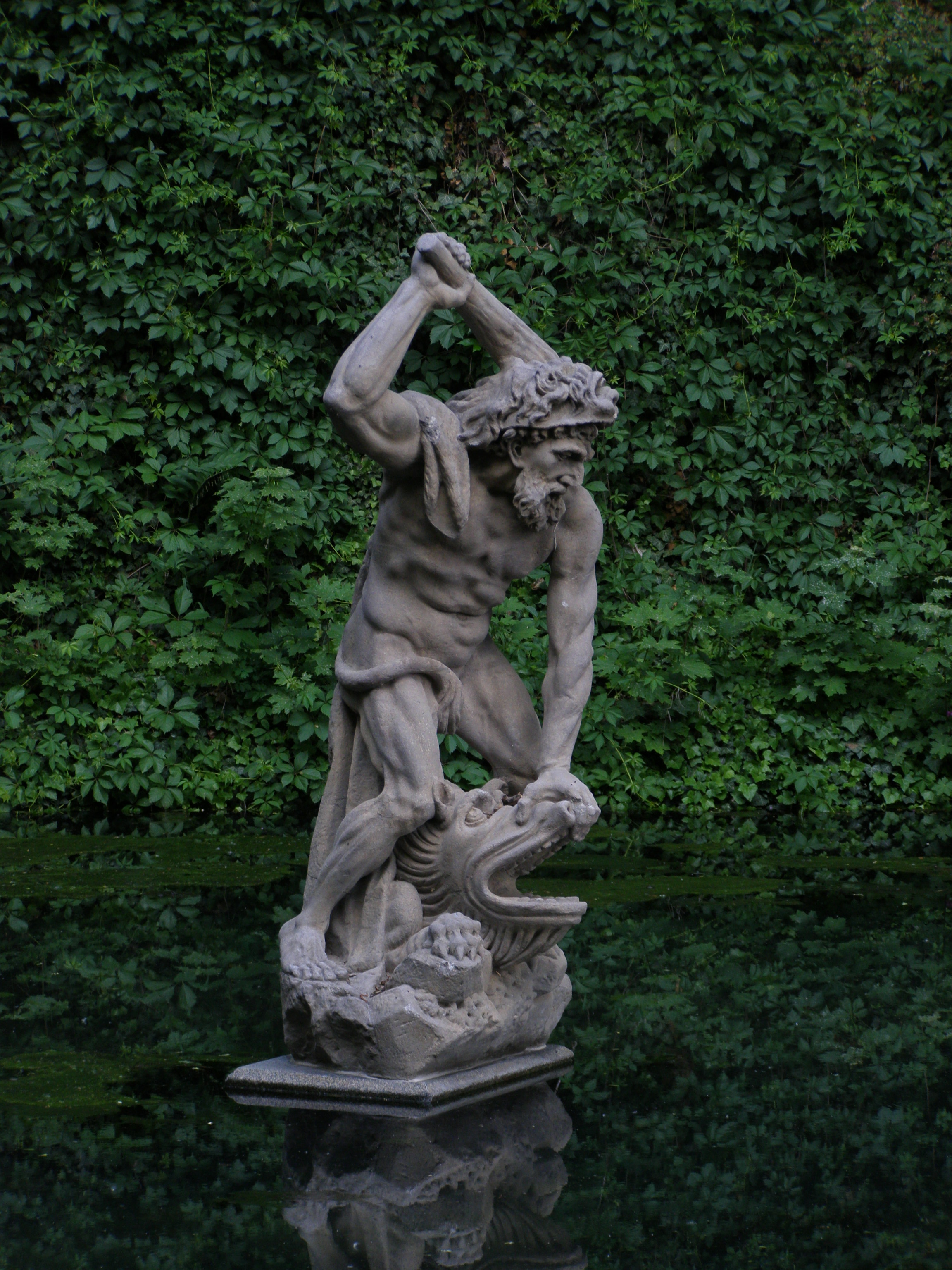 Praha, Smíchov, Kinského zahrada, socha uprostřed rybníčku